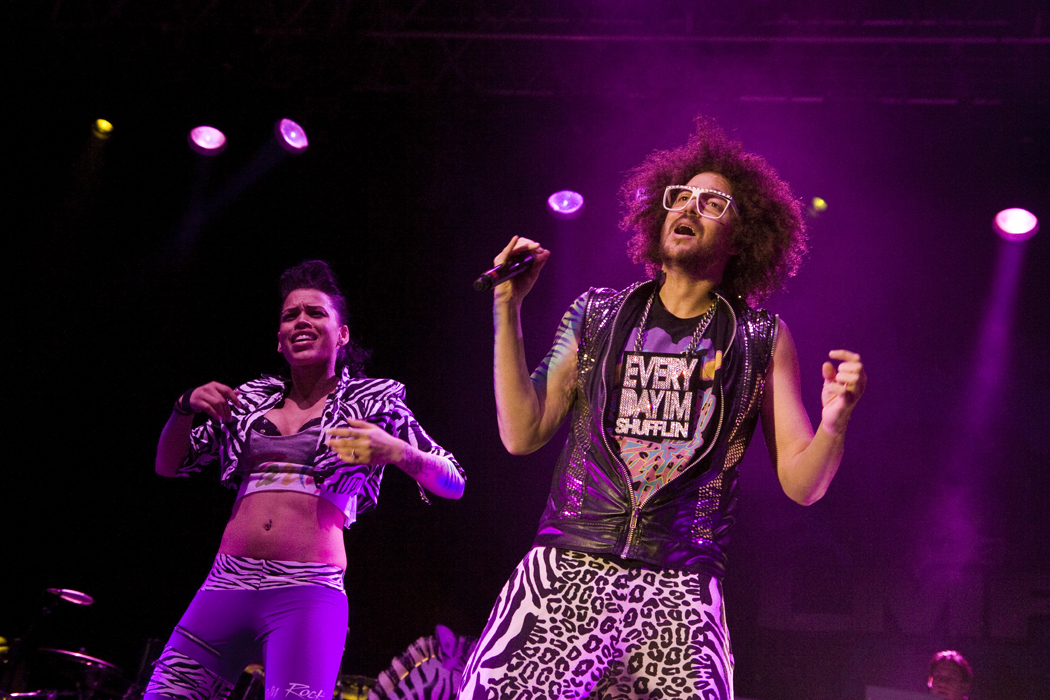 Fotos: Rosario López